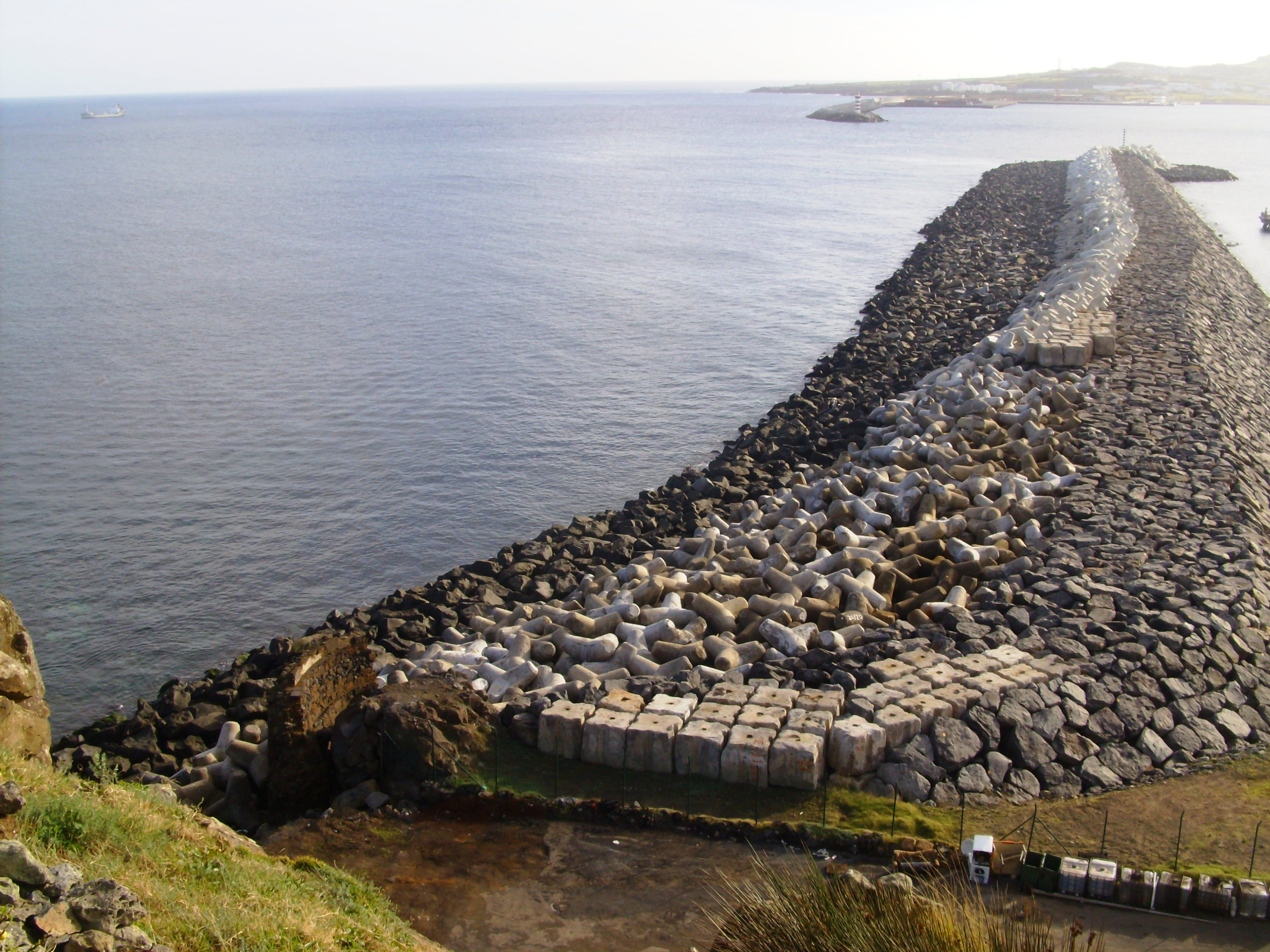 Forte do Espírito Santo, Praia da Vitória, Ilha Terceira, Açores: vista panorâmica do troço remanescente da muralha.